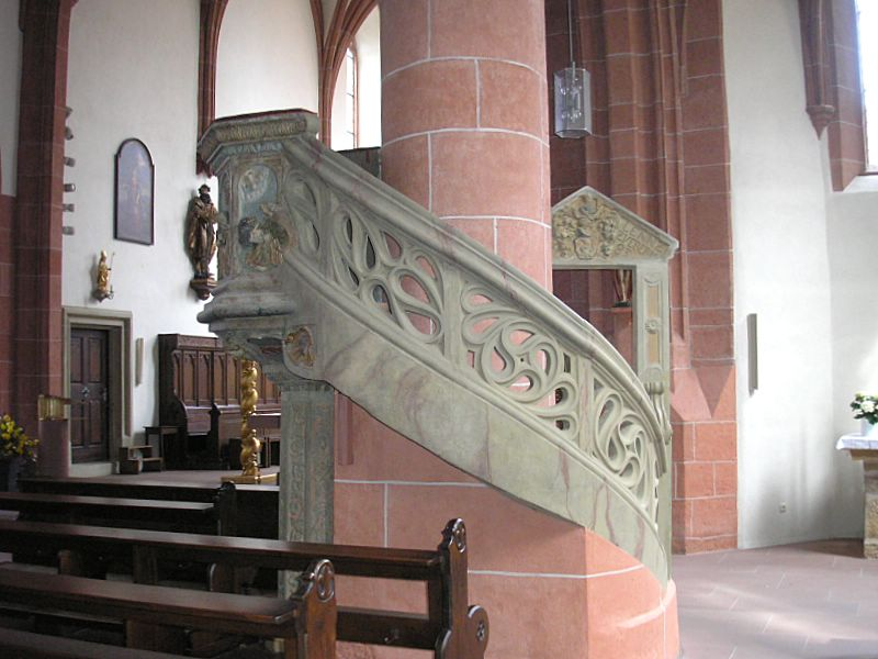 Stadtpfarrkirche St. Laurentius Ebern. Die Renaissancekanzel. Eigene Aufnahme, April 2006